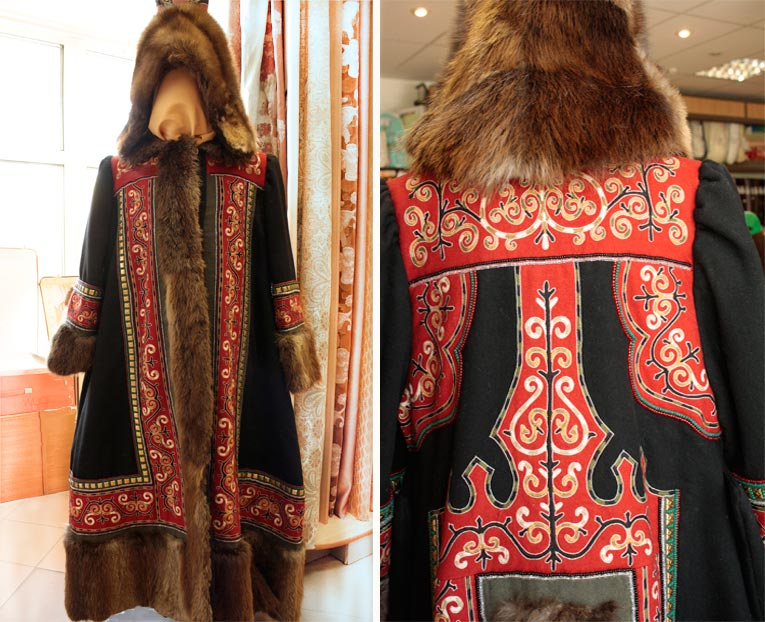 Традиционная якутская женская одежда (кытыылаах сон). Снято в 2008г. на выставке народного матера А.Зверевой.